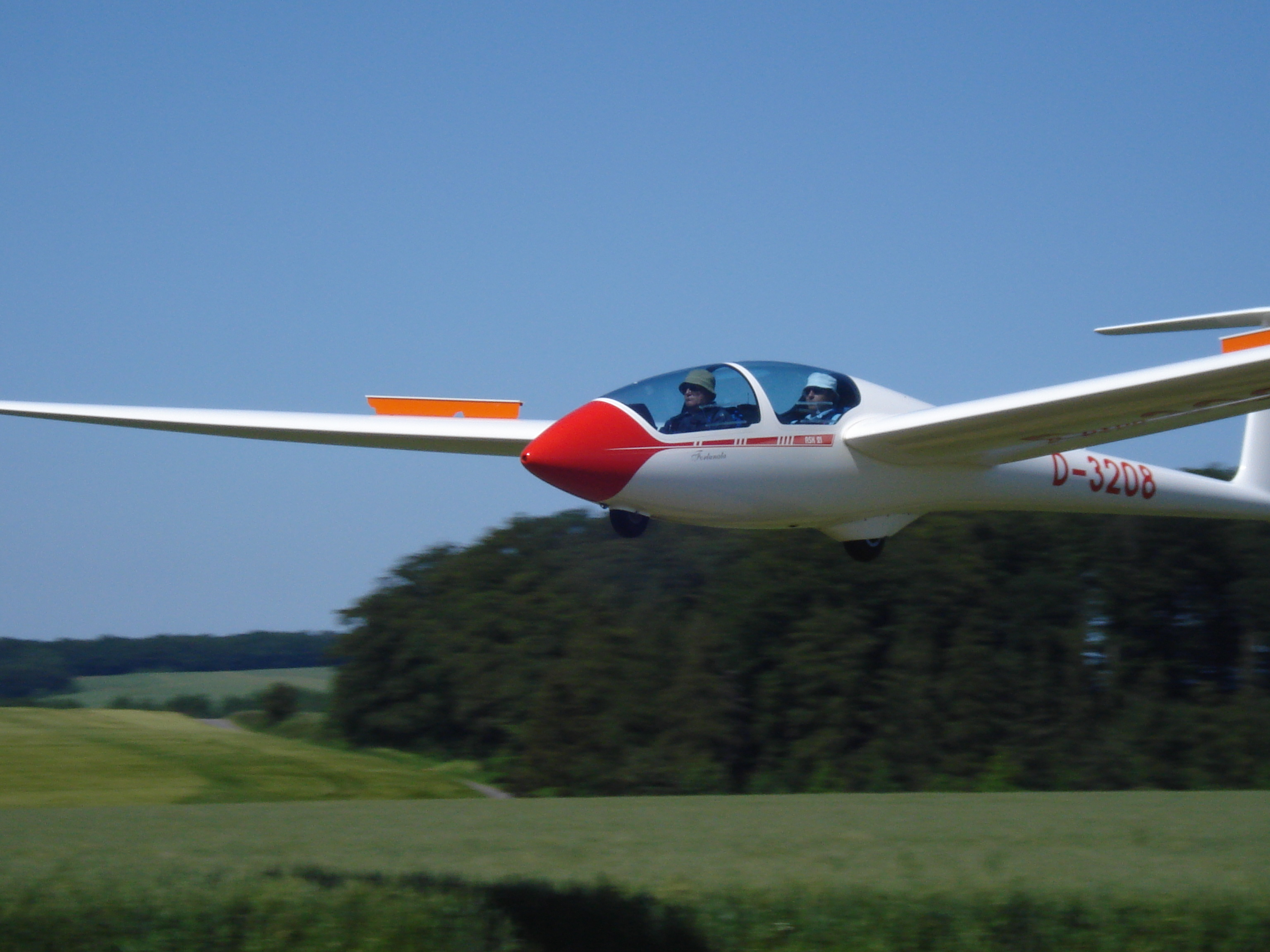 ASK 21 kurz vor dem Aufsetzten auf dem Flugplatz Günterode/Heiligenstadt